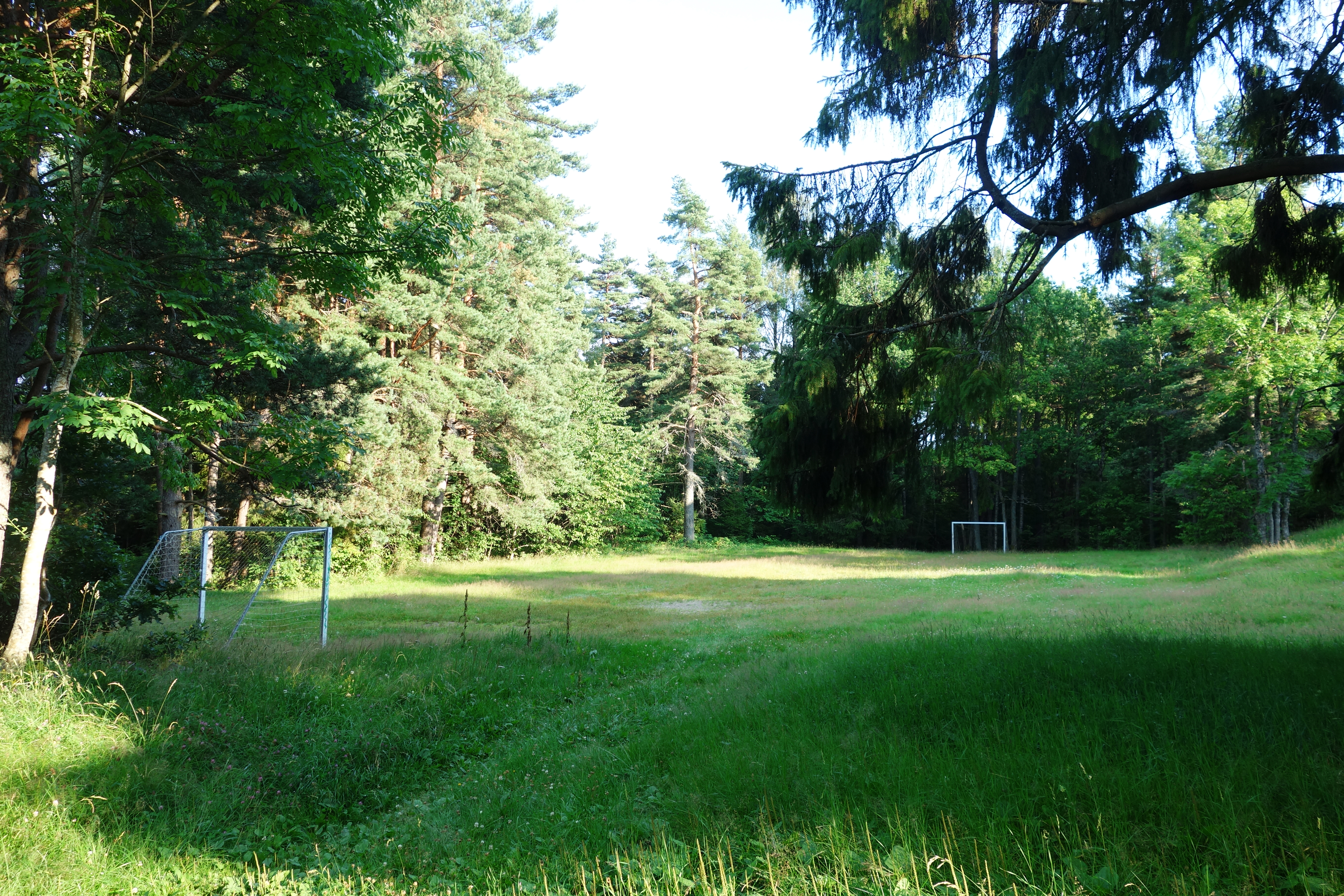 Aronsletta på Nøtterøy